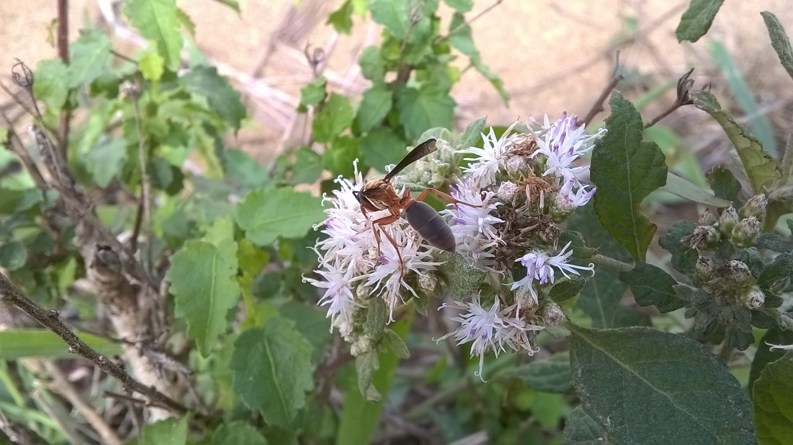 Marimbondo na flor.encontrado na região de Mata Cipó, Brejões -Ba.